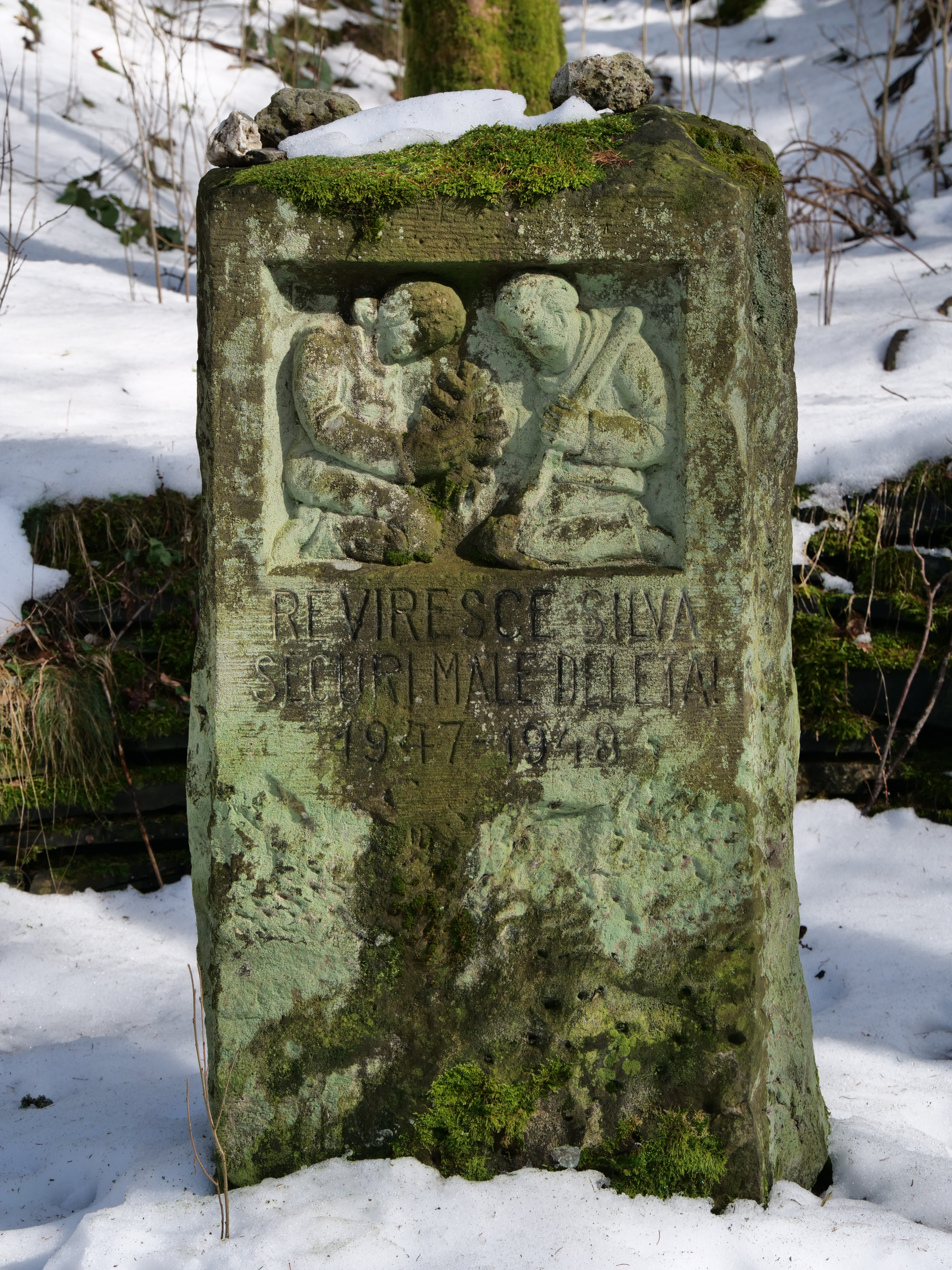 Gedenkstein an der Alten Harzstraße, nahe der oberen Haarnadelkurve der B 241 (Bushaltestelle Glockenbergkurve). Der Gedenkstein wurde vom Goslarer Bildhauer Georg Fürstenberg erschaffen. Er trägt die lateinische Inschrift Reviresce silva securi male deleta!, zu Deutsch Ergrüne wieder, Wald, von der Axt so übel zerstört! und erinnert an die Wiederaufforstung, des 1947-48 durch die britische Besatzung arg geschundenen Waldes.